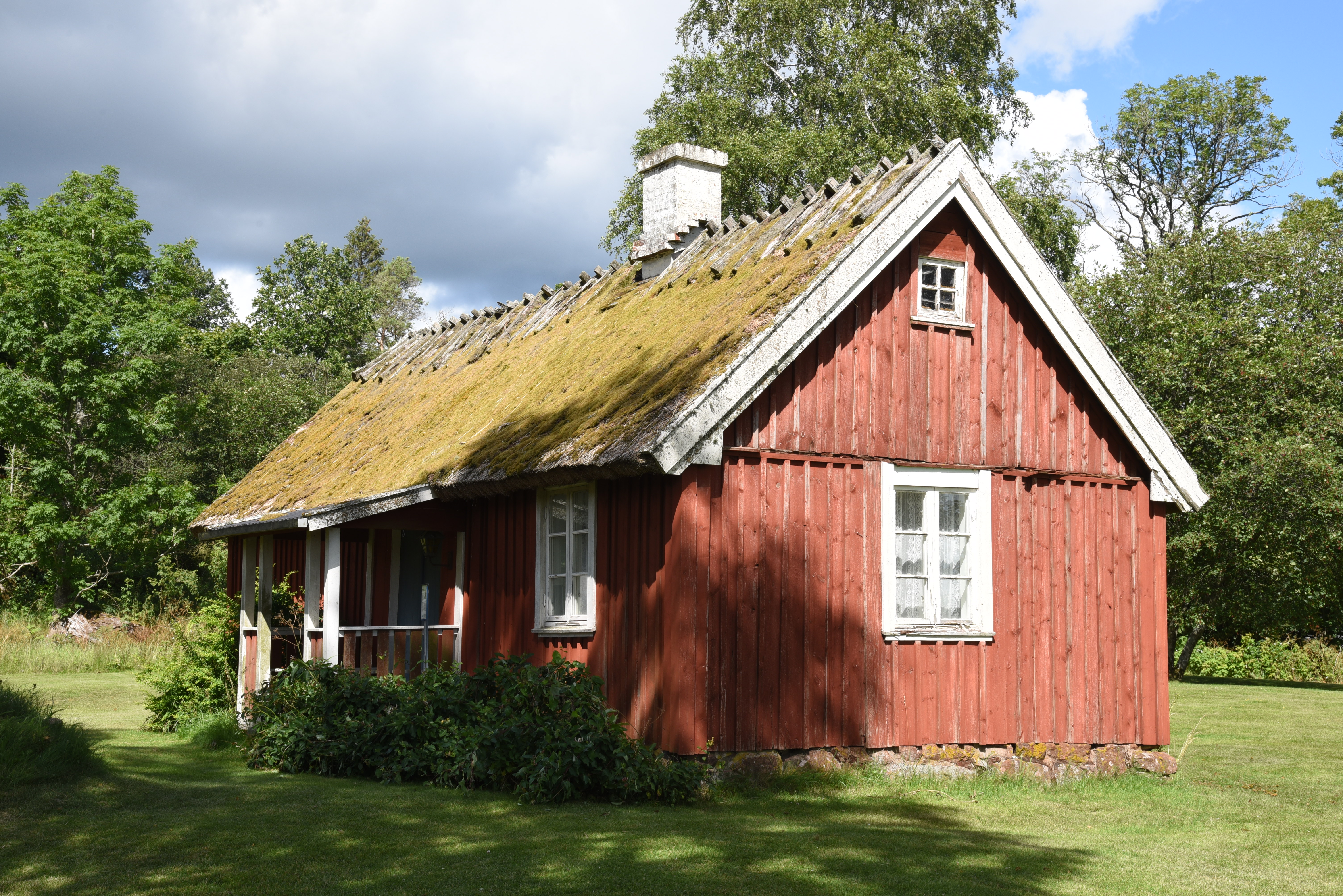 Severin Nilsons ateljéstuga i Asige, Torkelstorp Björsgård 110.